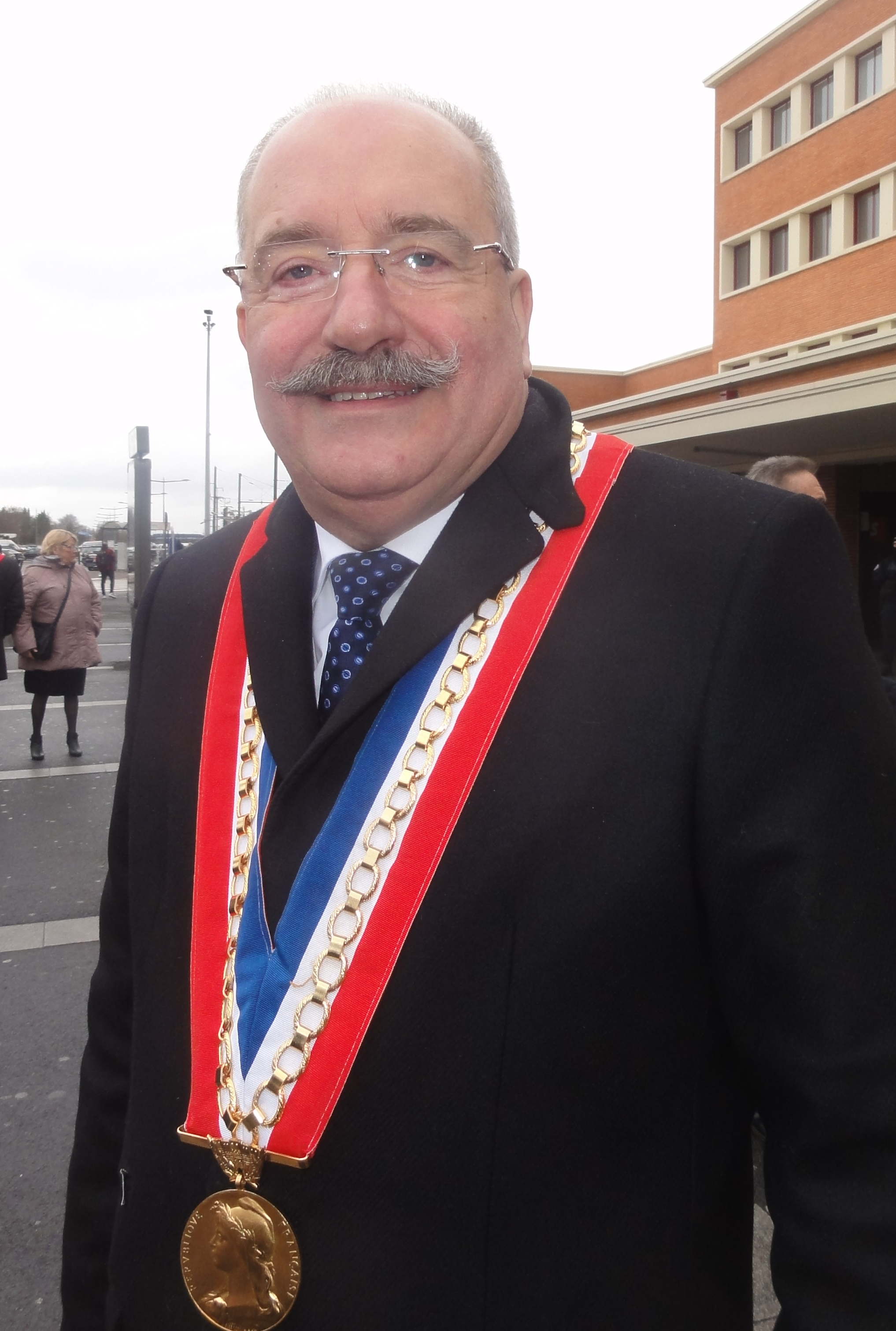 Manifestation contre la suppression des dessertes TGV en gare de Douai le 2 mars 2019. Depicted place: Douai railway station Depicted person: Christian Poiret – French politician